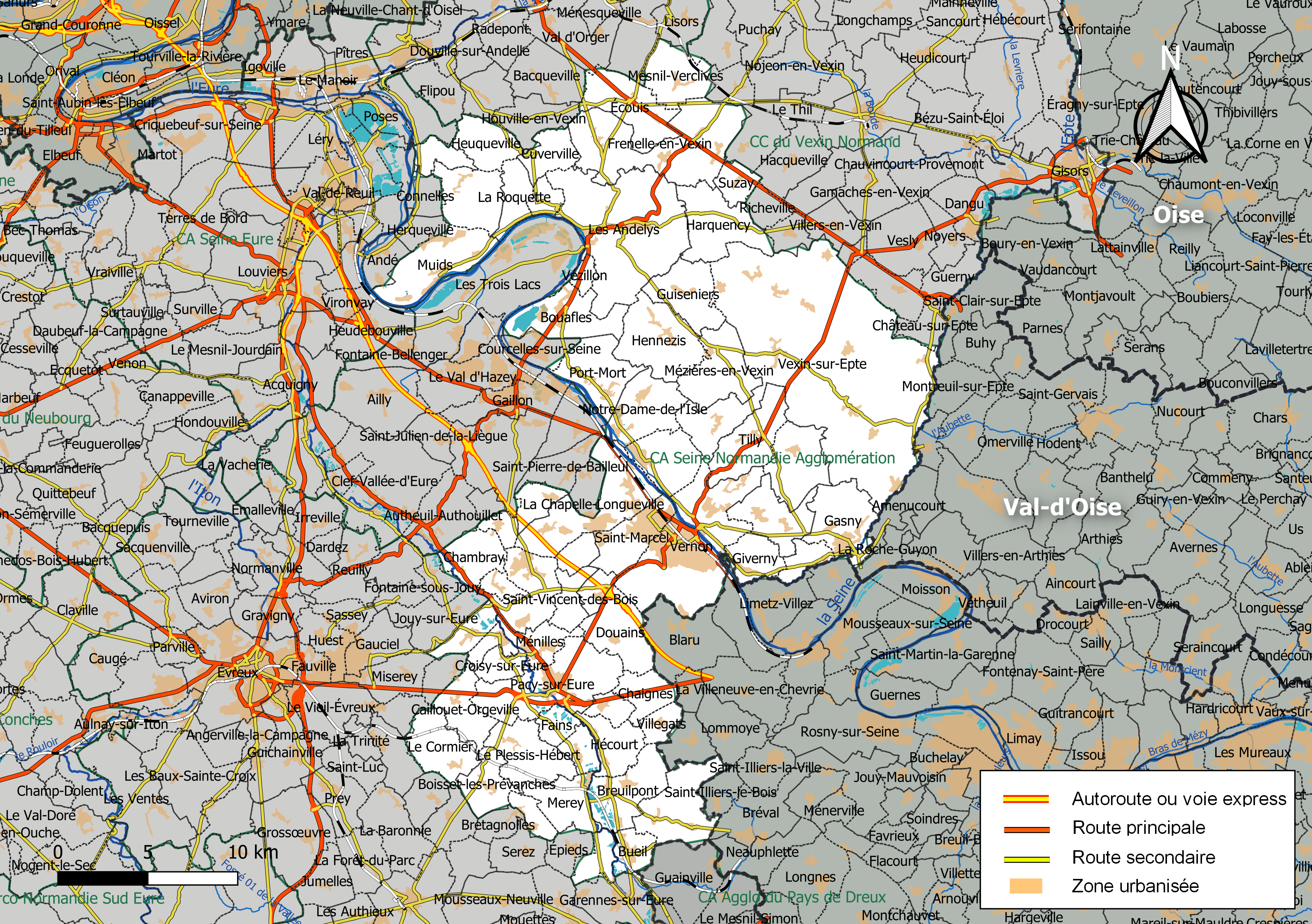 Carte géographique de l'intercommunalité Seine Normandie Agglomération, département de l'Eure, France. Composition au 1er janvier 2019.